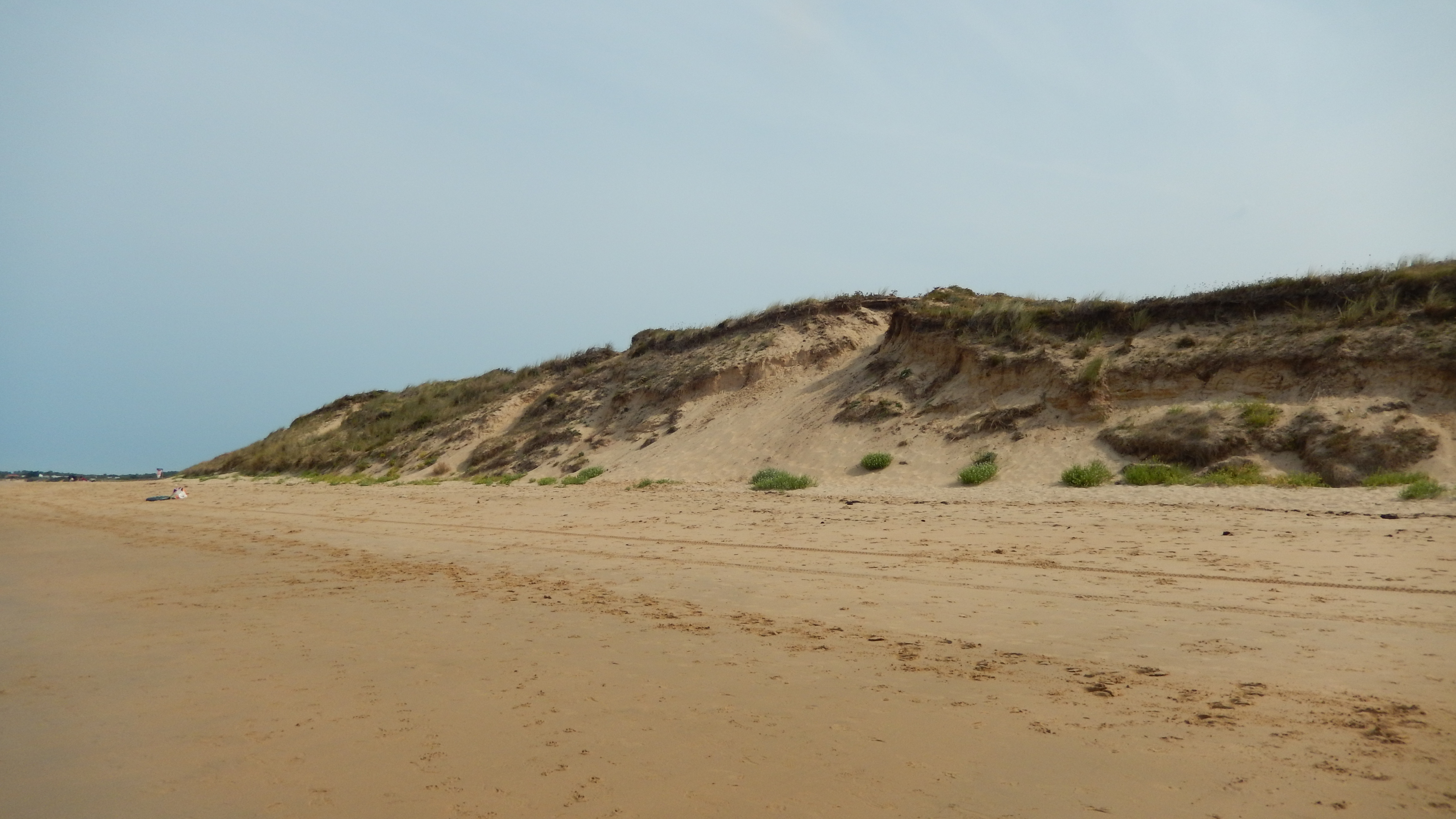 La plage des Sables Boisseau (voisine de celle des Sables Vignier), sur la côte Atlantique de l'île d'Oléron, dans la commune de Saint-Georges-d'Oléron.